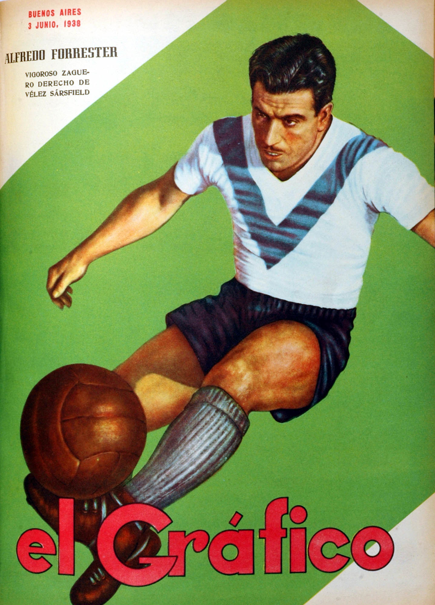 El Grafico del 03 de Junio de 1938. Edicion 986